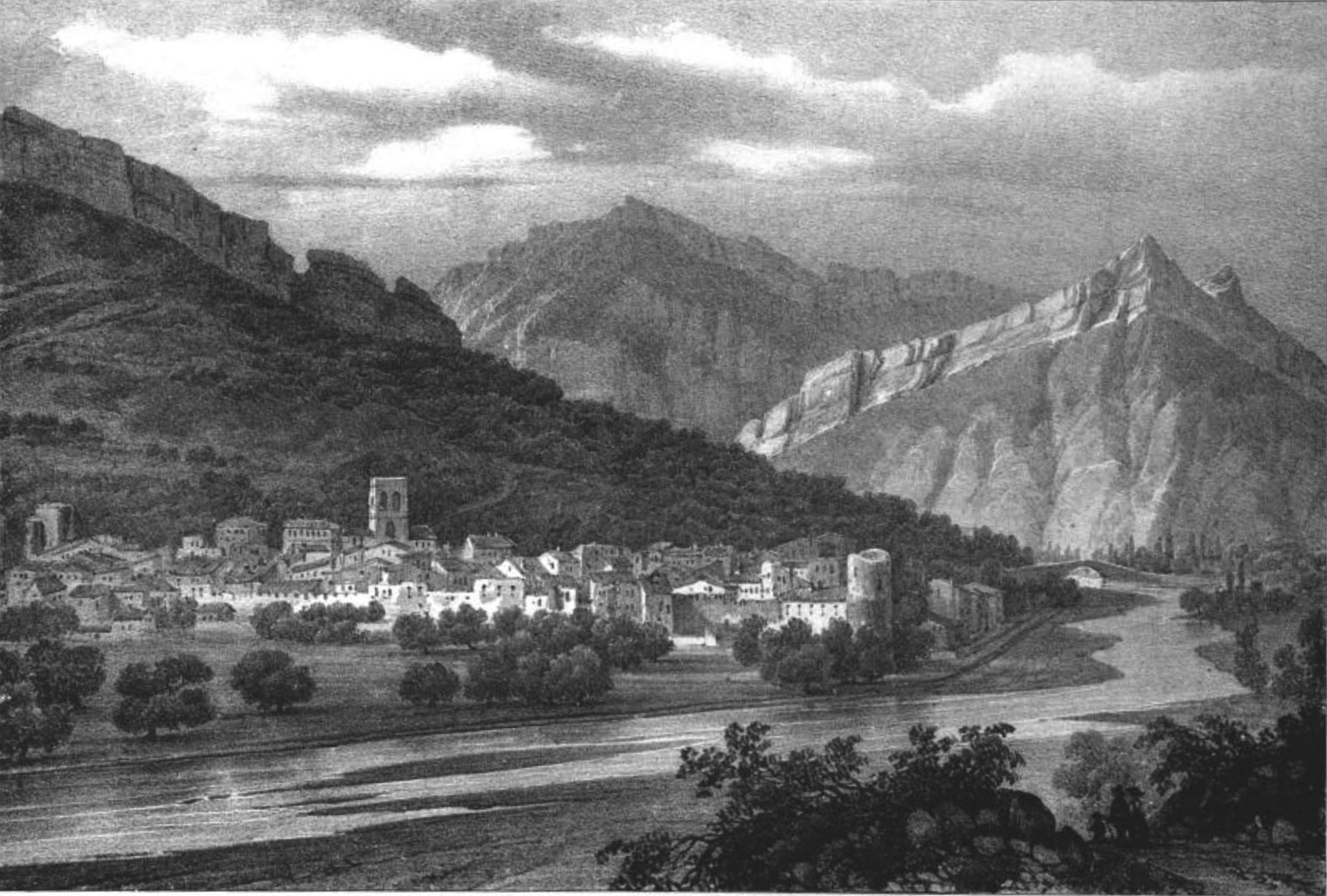 Le Buis (Drome)